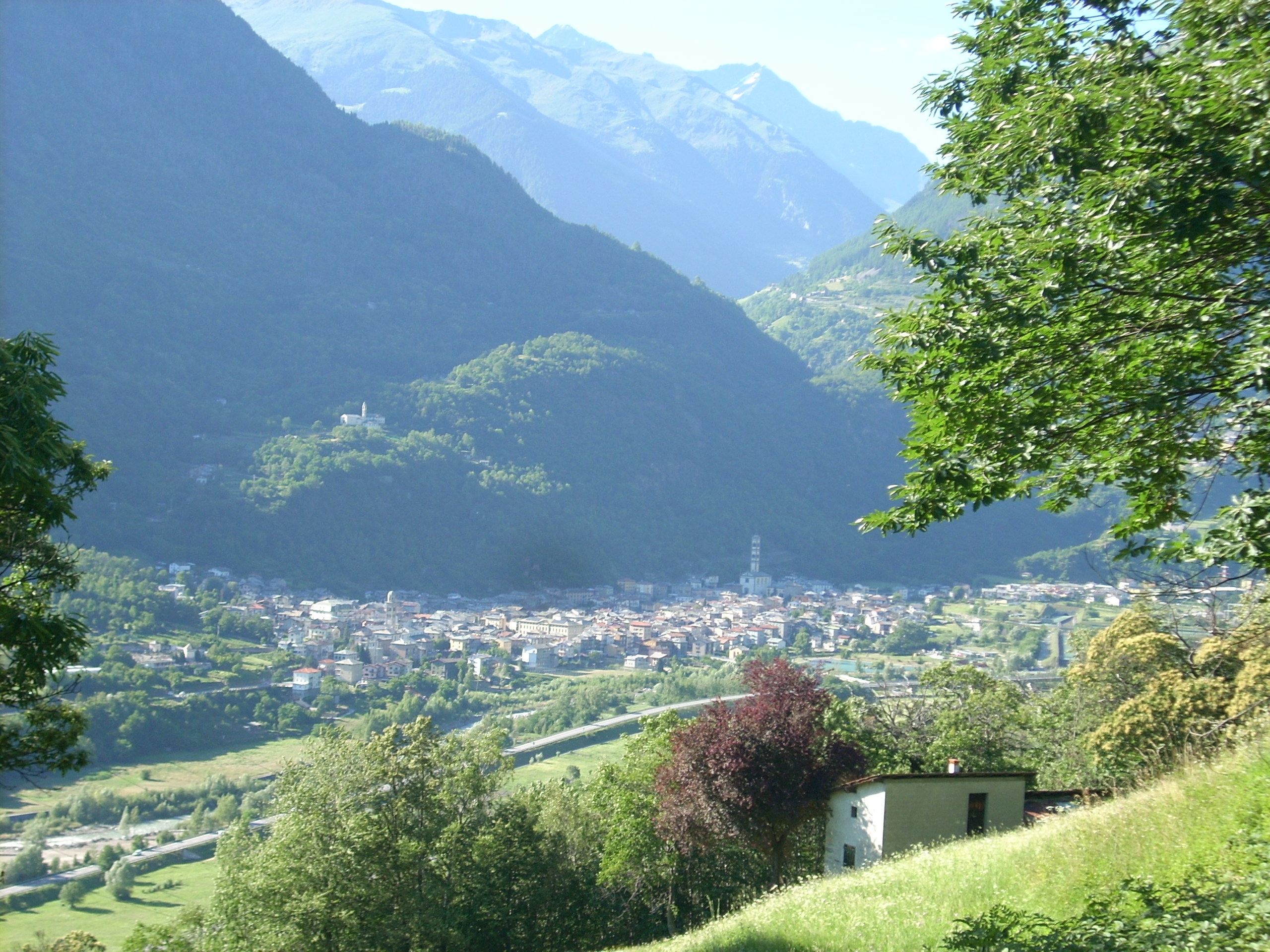 "ABITATO" DI GROSOTTO